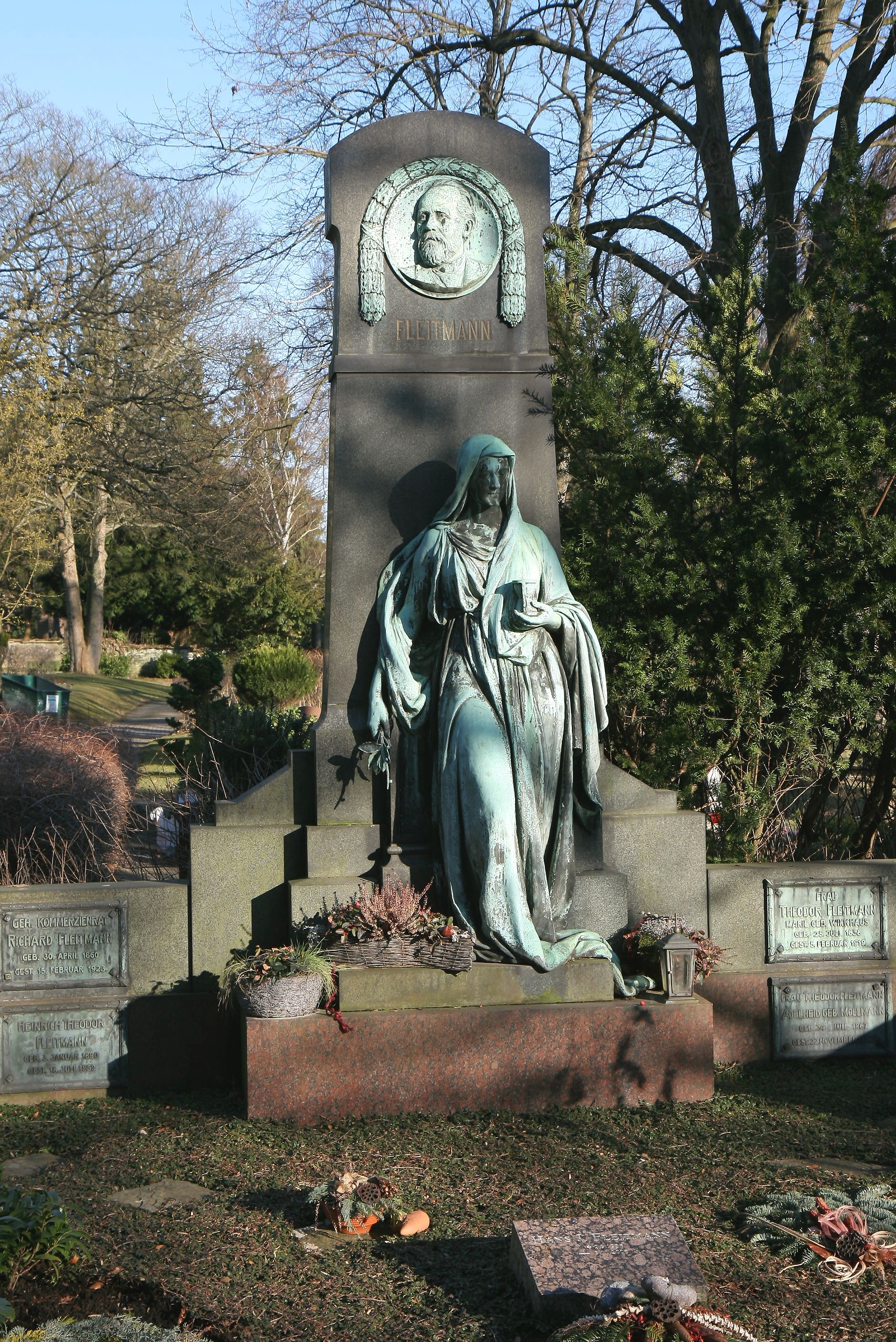 Grabmal Fleitmann auf dem Hauptfriedhof in Iserlohn, Oestricher Straße. Denkmal seit 28. November 1985. An der hohen schwarzen Marmorsäule befindet sich ein umkränztes Bronzerelief, das Theodor Fleitmann (1828-1904) zeigt. Vor der Marmorsäule ist eine Frauengestalt aus weißem Carrara-Marmor. This image shows a heritage building in Germany, located in the North Rhine-Westphalian city Iserlohn (no. 61).